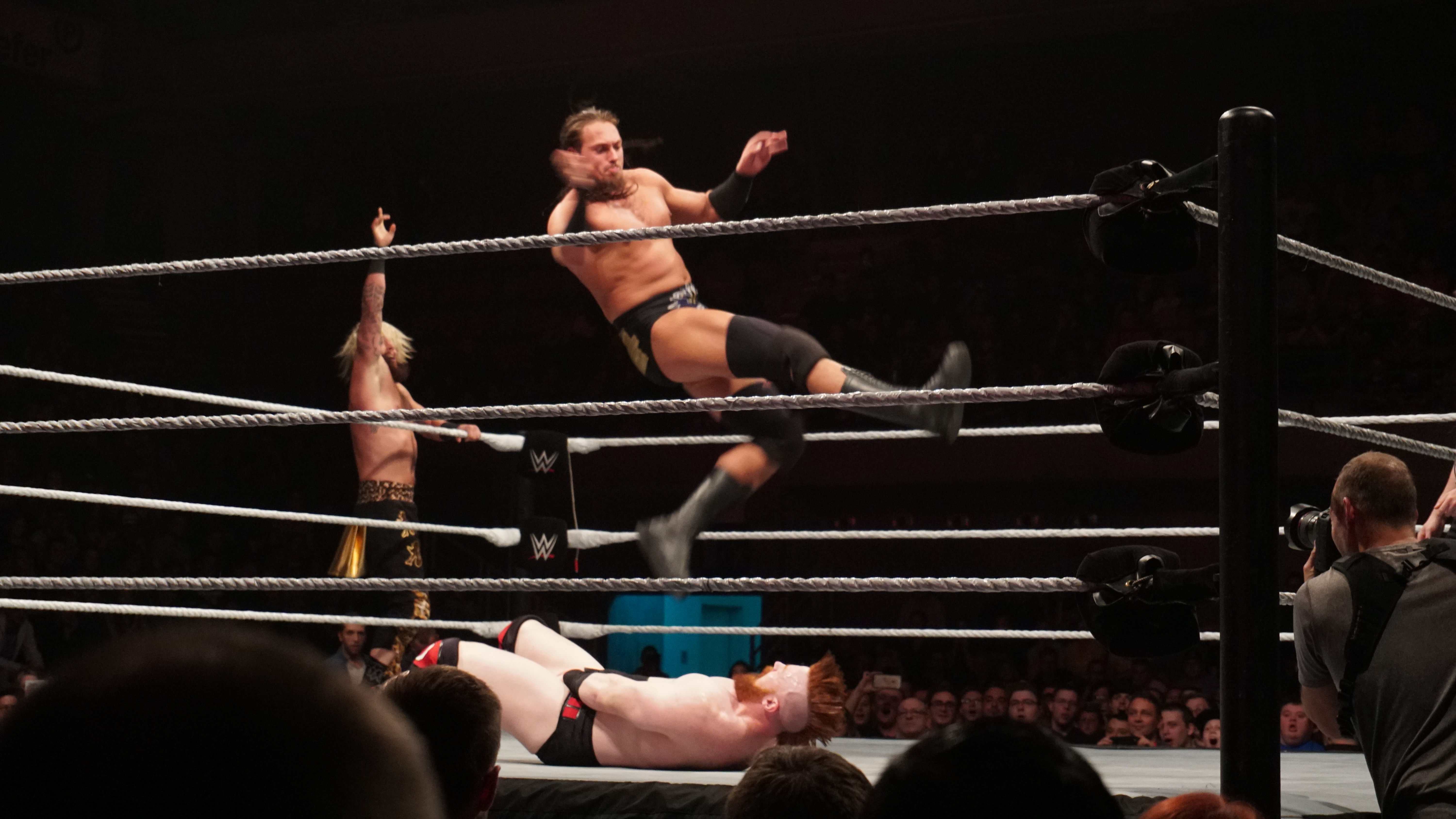 Jeff Hardy (c) & Matt Hardy (c) defeat Big Cass & Enzo Amore, Cesaro & Sheamus (in Triple Threat Match) Info on the match : WWE RAW Tag Team Title ( Le vendredi 12 mai, la WWE Live Tour fera escale au Country Hall a Liege pour le spectacle de catch de l'annee! Au programme: des duels impitoyables et des rencontres captivantes entre les meilleures equipes et les plus grands rivaux. )